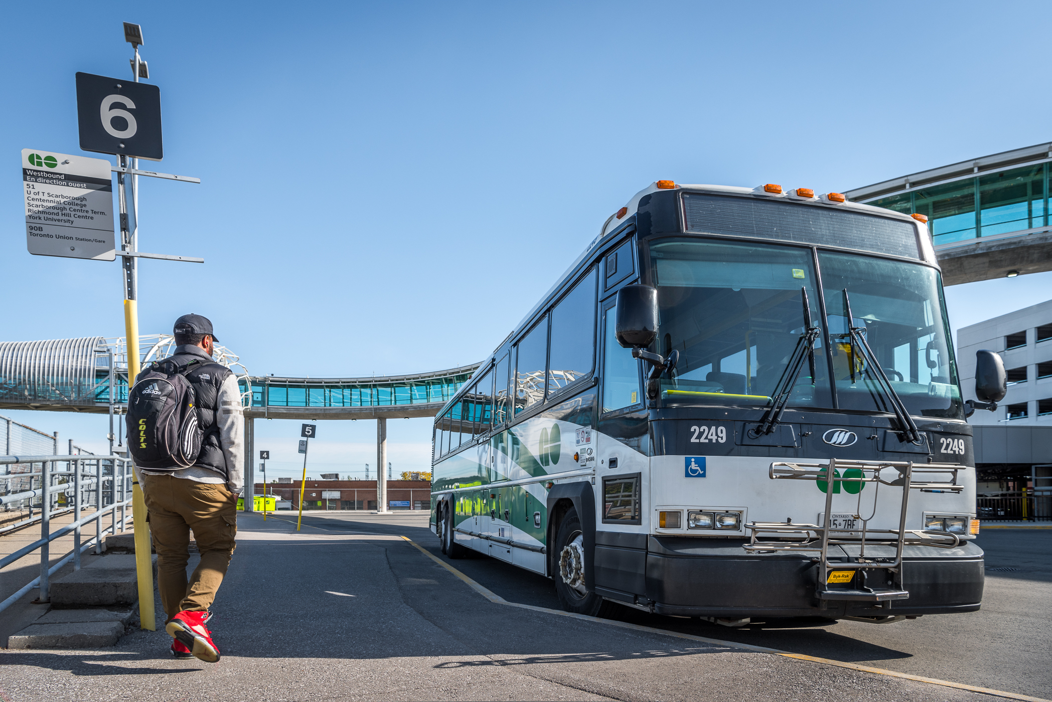 Disclaimer: By downloading this image I agree to give credit in legible (minimum 8pt) text adjacent to the image as “Copyright Queen's Printer for Ontario, photo source: Ontario Growth Secretariat, Ministry of Municipal Affairs”. -- Avis important: En téléchargeant ces images, j’accepte de faire figurer la mention suivante en caractères lisibles (minimum 8 pt) à côté de l’image : « Droit d'auteur : Imprimeur de la Reine pour l'Ontario, photographie obtenue auprès du : Secrétariat des initiatives de croissance de l’Ontario, ministère des affaires municipales ».